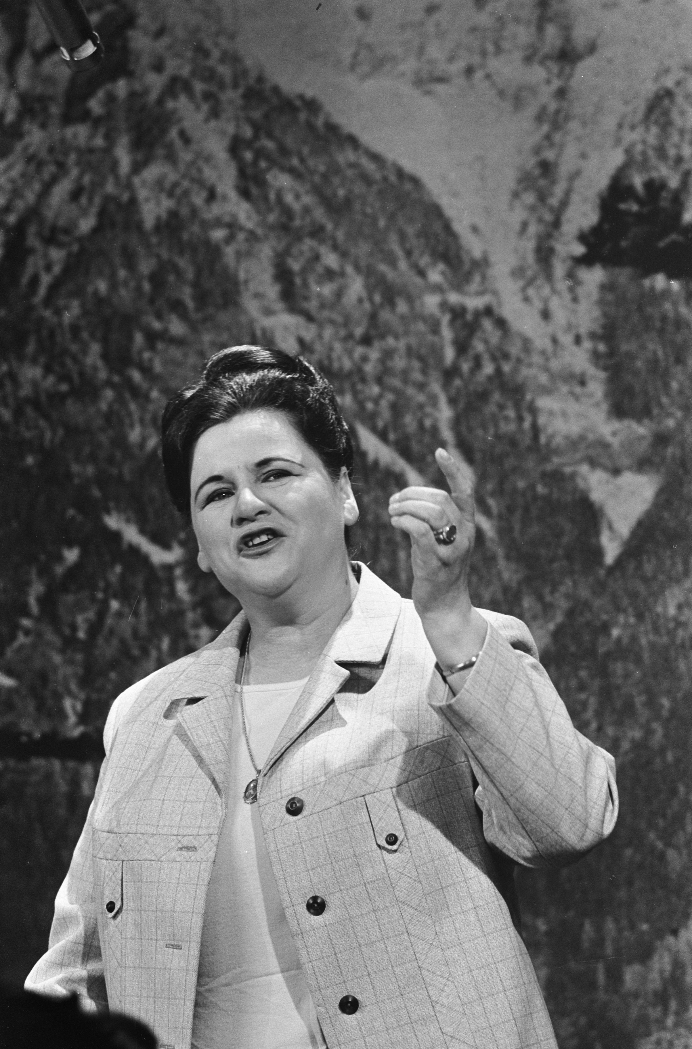 Collectie / Archief : Fotocollectie Anefo Reportage / Serie : [ onbekend ] Beschrijving : "Hoepla" voor VPRO-TV. Olga Lowina met jodellied Datum : 22 september 1967 Trefwoorden : muziek, programma's, televisie, zangeressen Persoonsnaam : Lowina Olga Instellingsnaam : VPRO Fotograaf : Kroon, Ron / Anefo Auteursrechthebbende : Nationaal Archief Materiaalsoort : Negatief (zwart/wit) Nummer archiefinventaris : bekijk toegang 2.24.01.05 Bestanddeelnummer : 920-7285